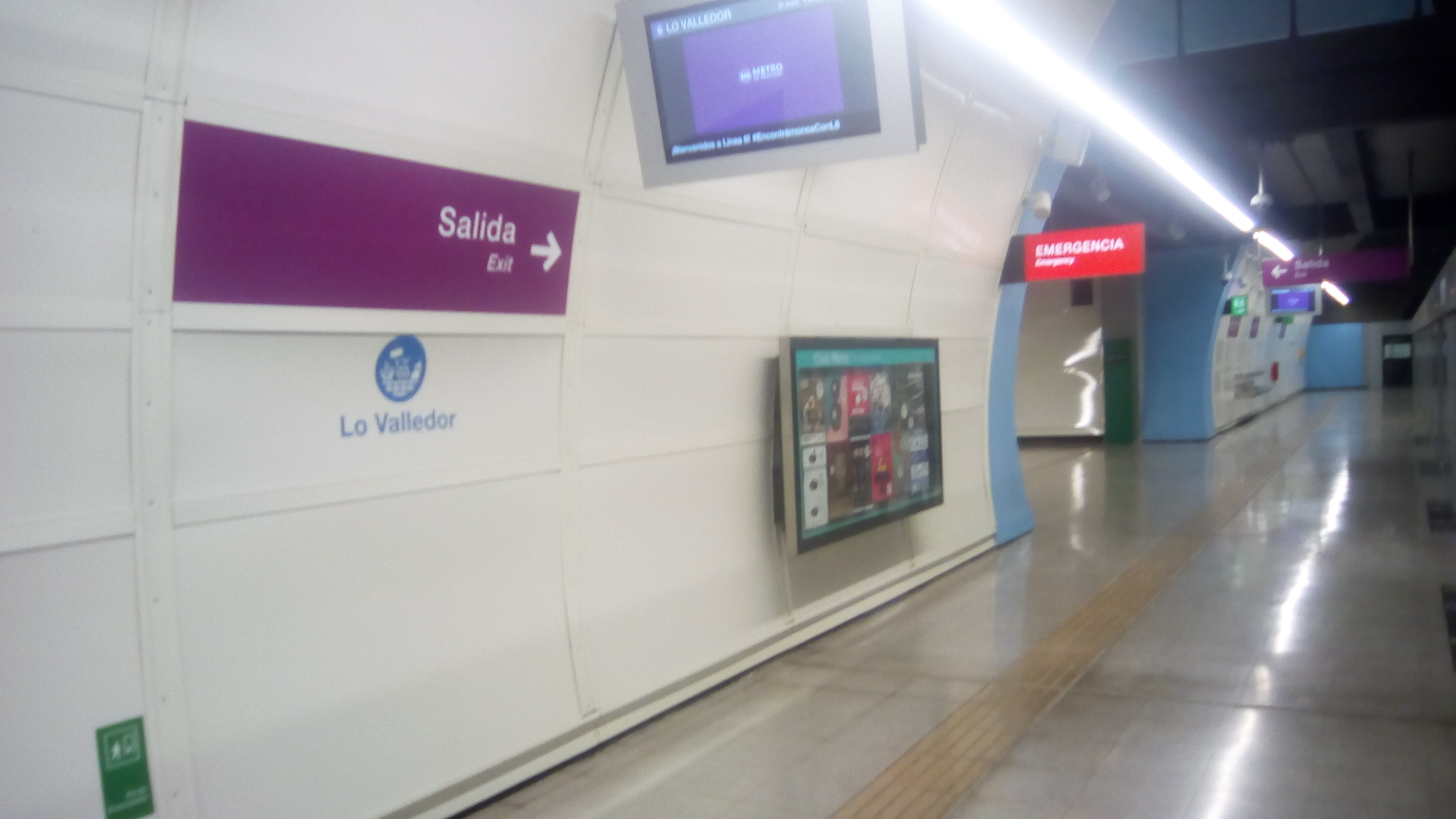 Estación Lo Valledor